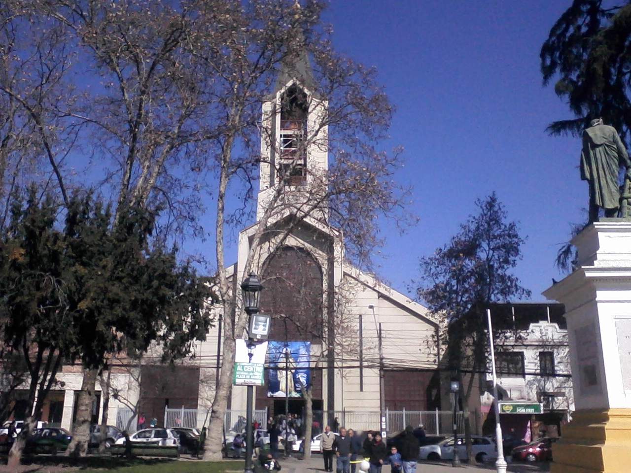 Catedral de San Bernardo , Chile